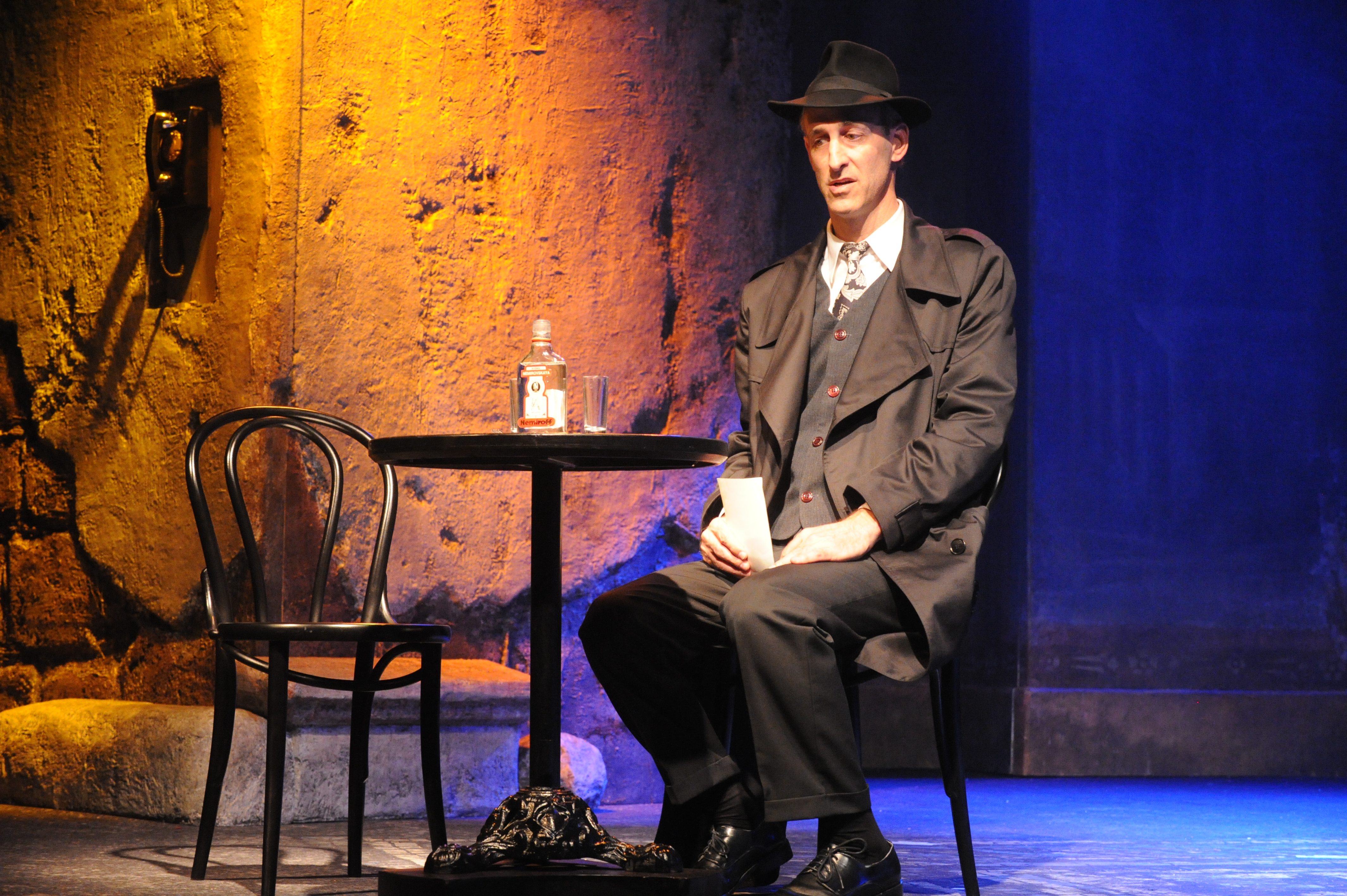 ניר רון בהצגה "חוקר פרטי", מאת ובבימויו של מיקי גורביץ', תיאטרון החאן, 2011